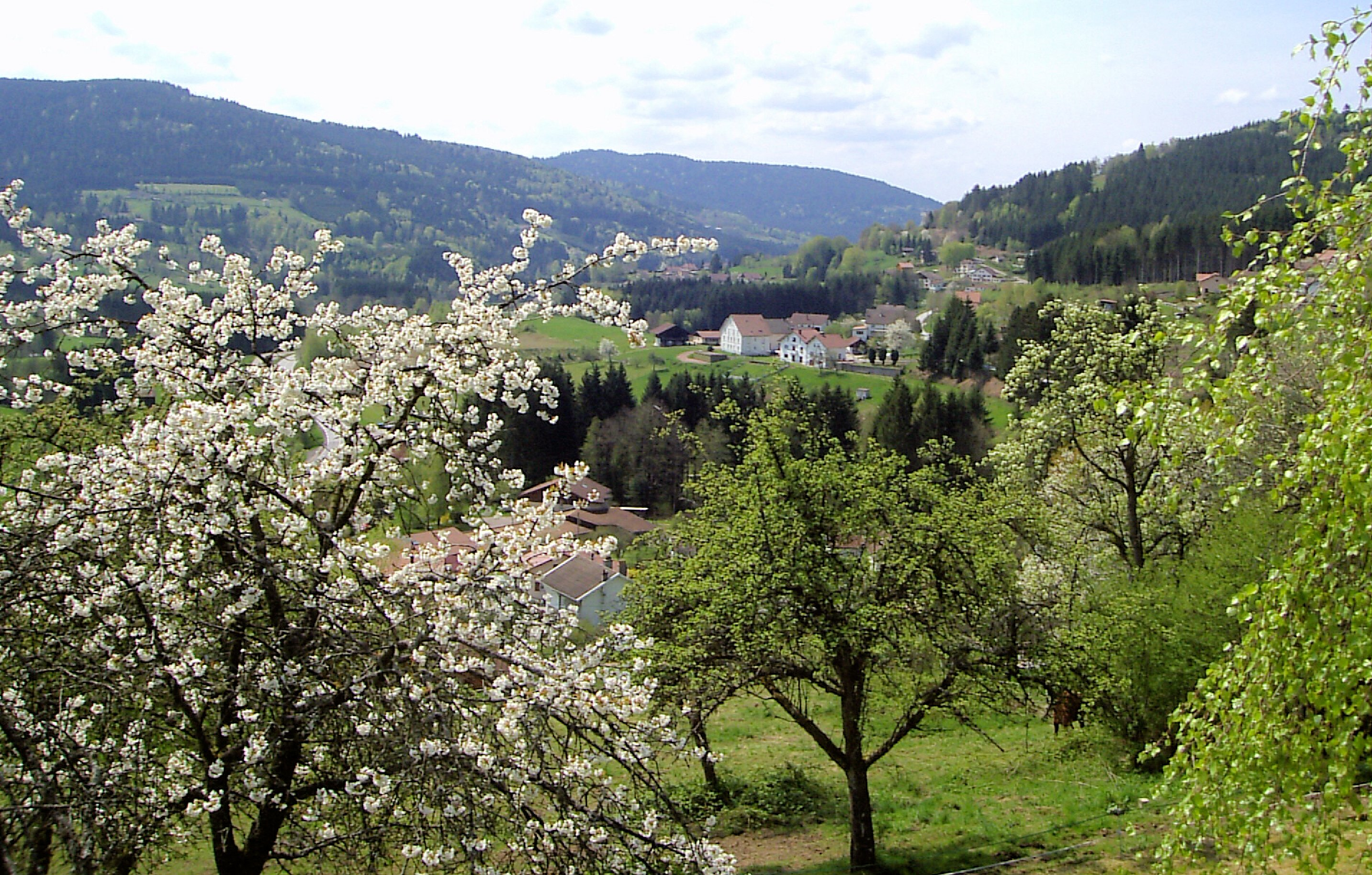 Vallée de Cleurie